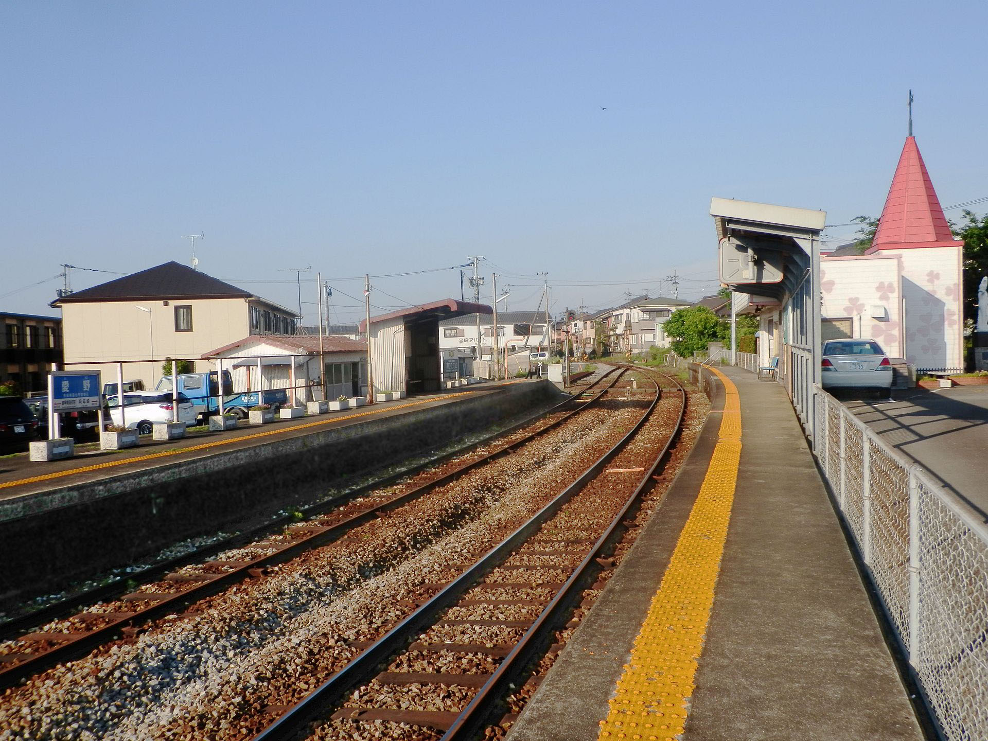 島原鉄道・愛野駅のホーム。